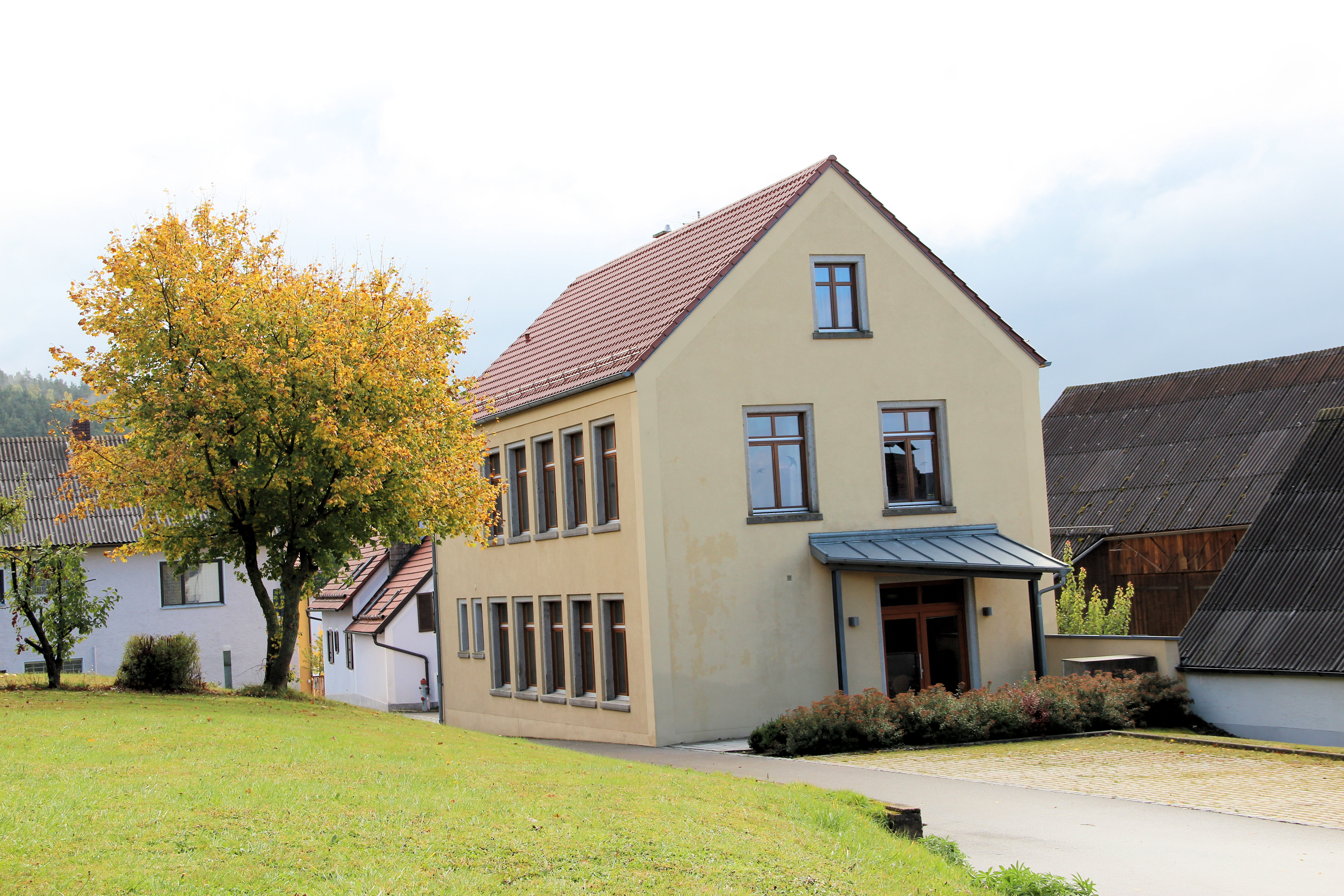 Das Schulhaus am Pfarrweg von Gleiritsch wurde 1888 errichtet. Im Erdgeschoss und im Obergeschoss gab es jeweils ein Klassenzimmer. Der Unterricht für die Klassen 1 bis 4 erfolgte im Untergeschoss, die Klassen 5 bis 8 wurden im Obergeschoss unterrichtet. Da das Gebäude am Anfang der 1960er Jahre aus allen Nähten platzte, erfolgte der Unterricht im Schichtbetrieb. Im wöchentlichen Wechsel hatte die erste Schicht am Vormittag Unterricht, die zweite Schicht am Nachmittag. Eine Turnhalle war nicht vorhanden. Als Übungsplatz für Sport diente die Straße vor dem Schulgebäude, der alte Sportplatz, die Waldabteilung Plassenberg, der Seeweiher beim Maximilianshof (der heutige Badeweiher in der Kroau entstand erst im Rahmen der Flurbereinigung 1972) oder im Winter die Peternleite . Der Schulbetrieb endete im Frühjahr 1967. Auf Initiative von Expositus Alois W. Dirschwigl und unter der Bauleitung von Architekt Ludwig Köppl erfolgte der Umbau des Gebäudes zu einem Pfarrheim: Gemeinde Gleiritsch, Landkreis Schwandorf, Oberpfalz, Bayern